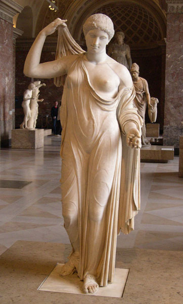 Venus Genitrix. Còpia d’un original grec atribuït a Cal·límac